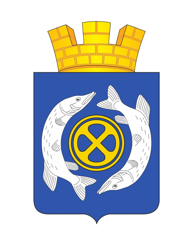 Герб города Щучье (2013)